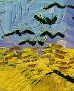 תקריב על פי הקובץ תמונה:Vincent van Gogh (1853-1890) - Wheat Field with Crows (1890).jpg